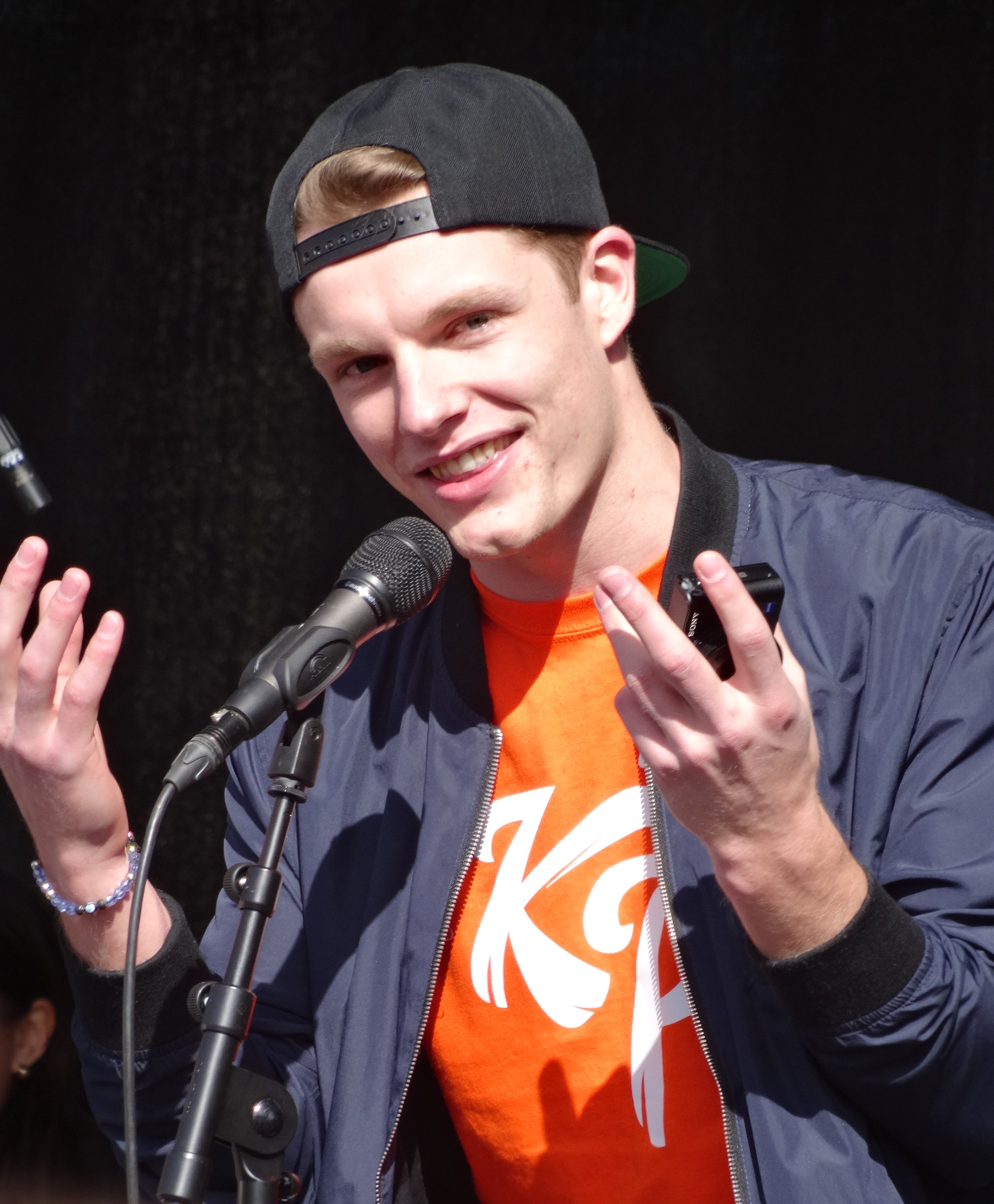 Enzo Knol bij de opening van Koningsdag 2015 in Assen